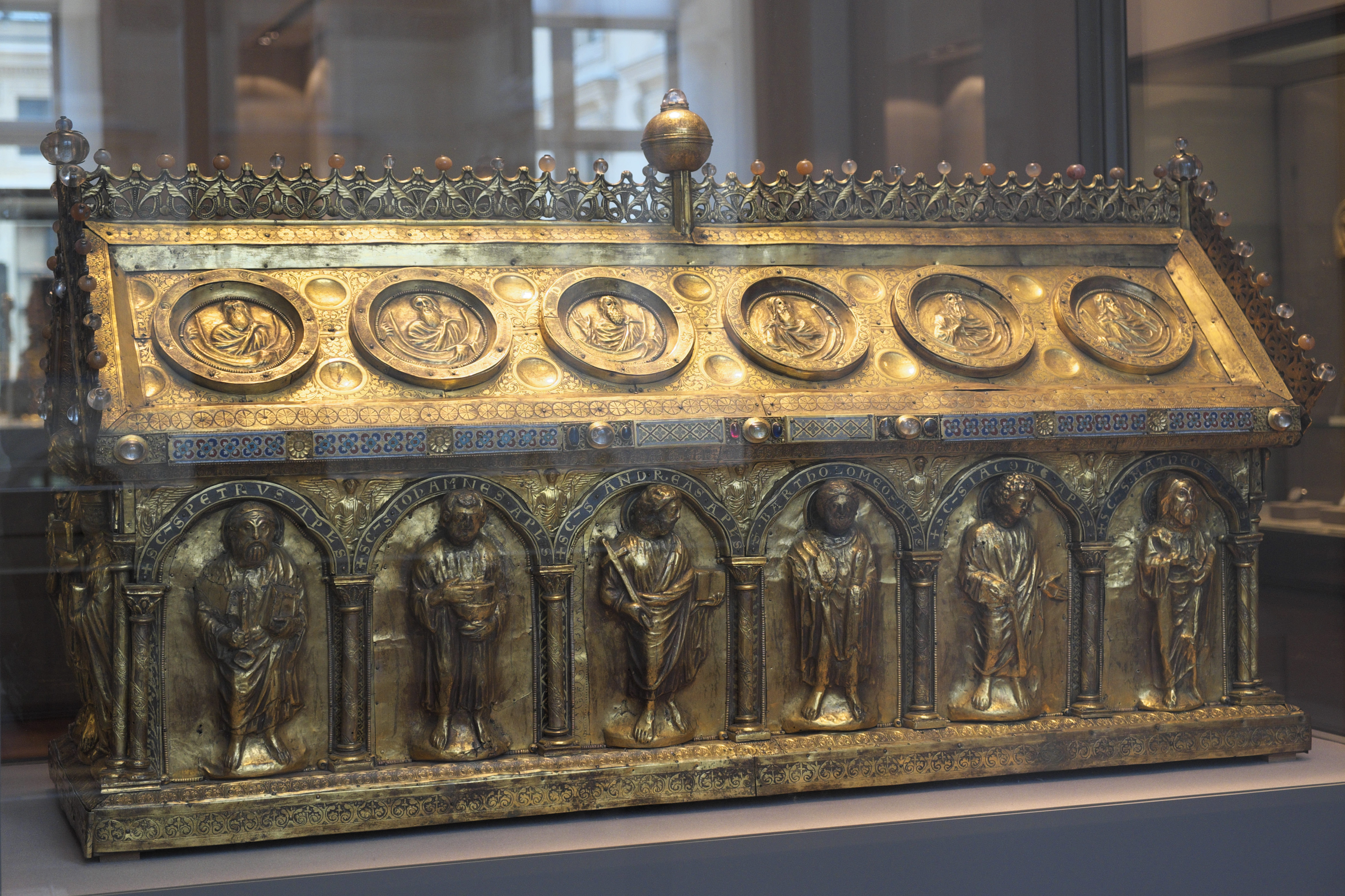 Potentinusschrein aus dem ehemaligen Prämonstratenserkloster Steinfeld in Steinfeld im Kreis Euskirchen (Nordrhein-Westfalen/Deutschland), heute im Musée du Louvre in Paris (Frankreich), Goldschmiedearbeit, um 1220/40 in der Gegend von Trier geschaffen